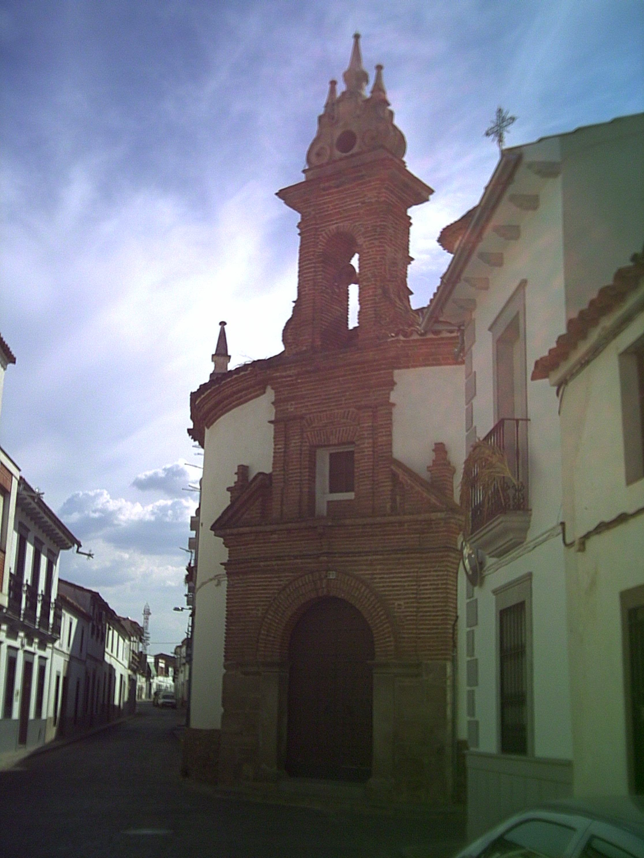 Vista exterior de la Ermita de San Isidro Labrador, en Hinojosa del Duque (Córdoba)